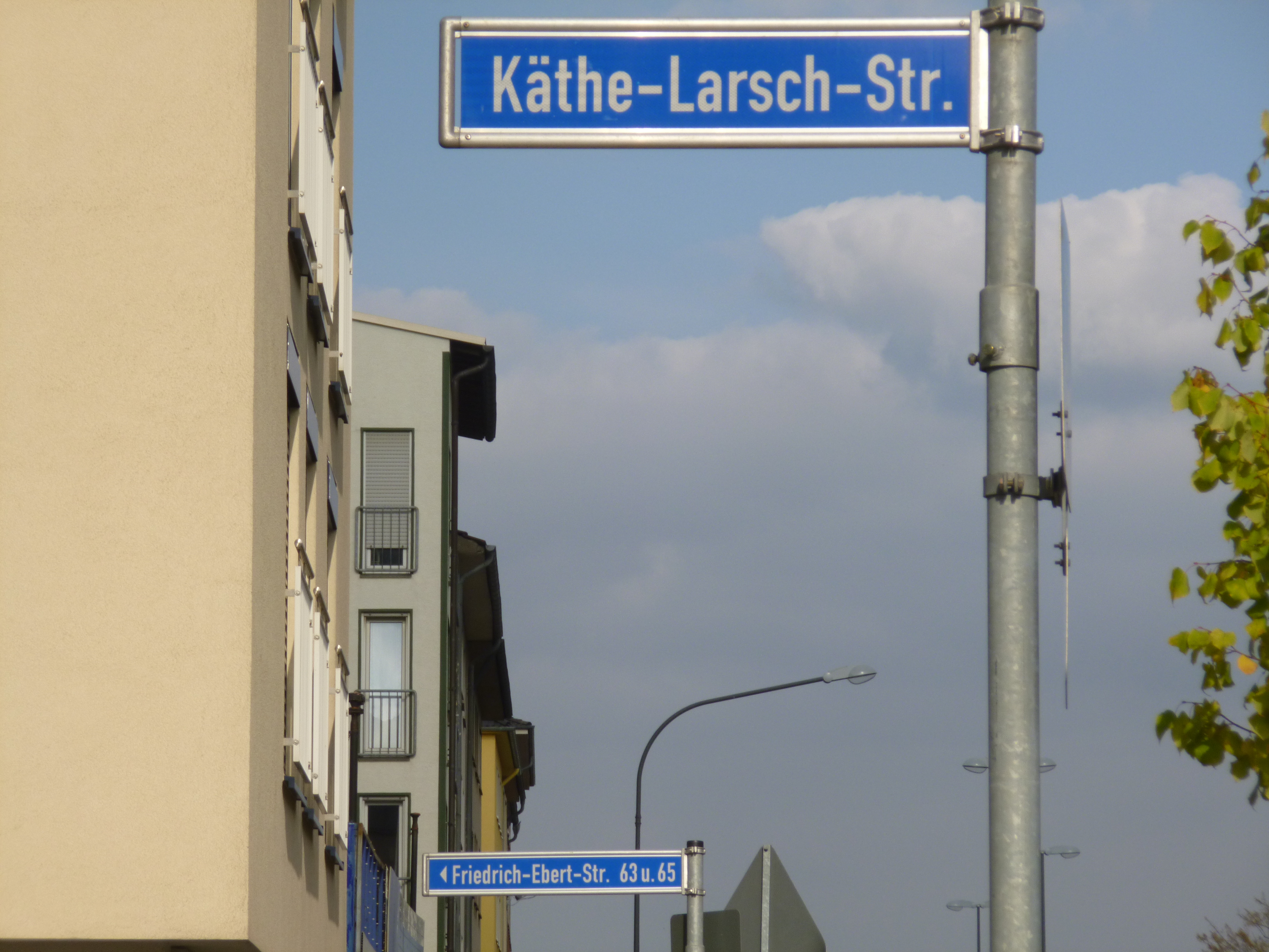 Straßenschild der Käthe-Larsch-Straße an der Friedrich-Ebert-Straße